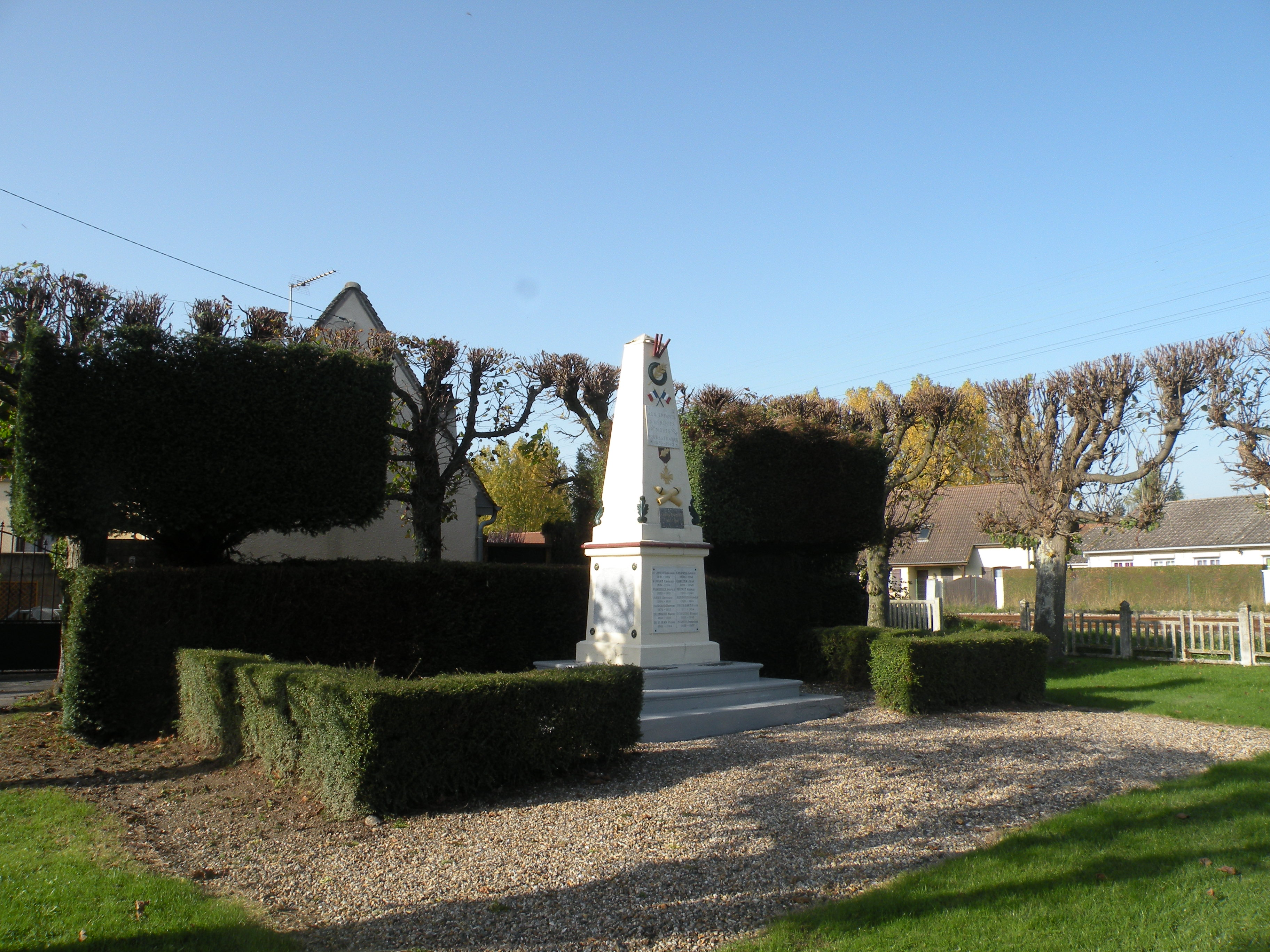 monuments aux morts de Herchies